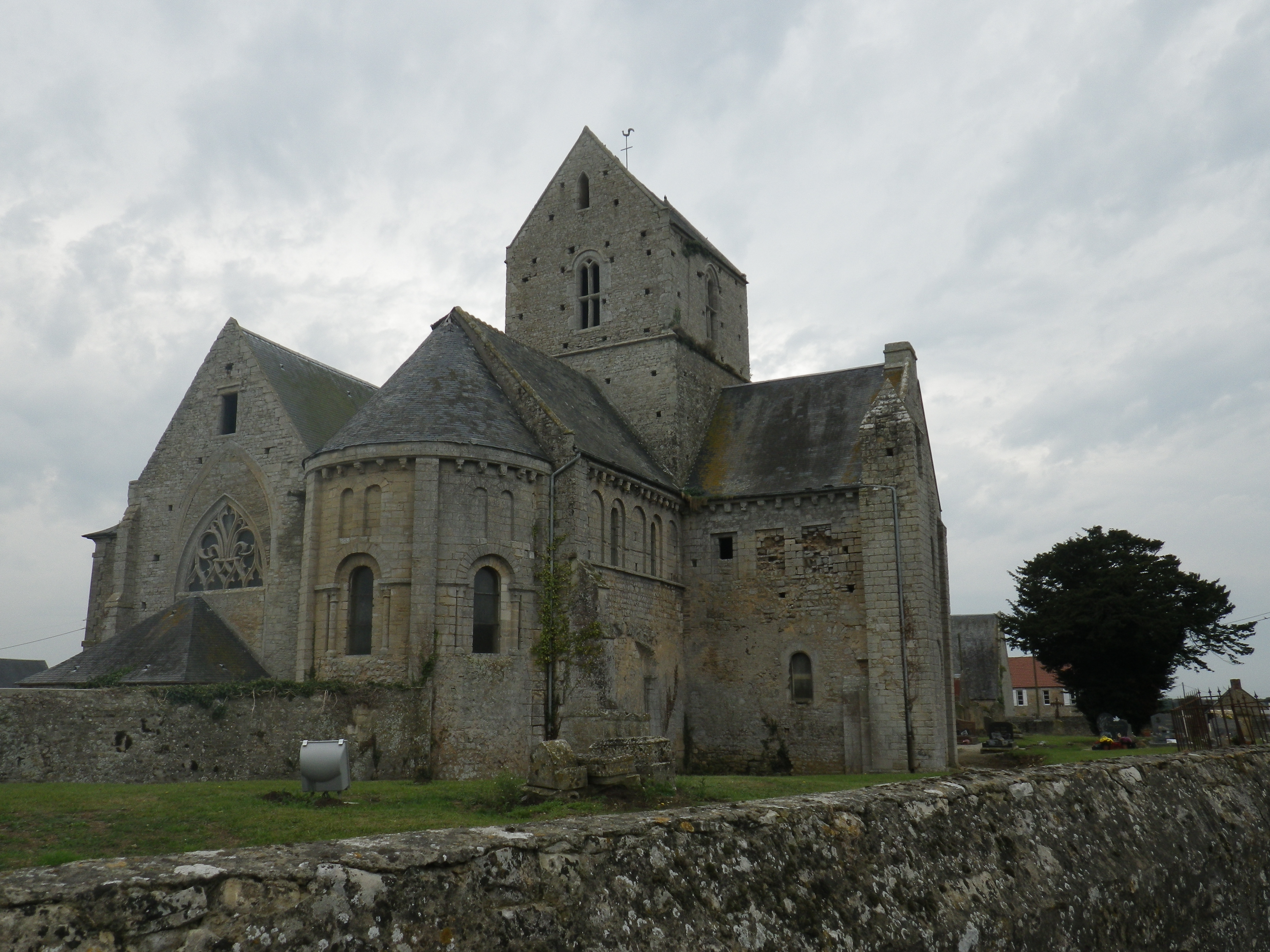 Chapelle de l'abbaye des Deux-Jumeaux, Calvados